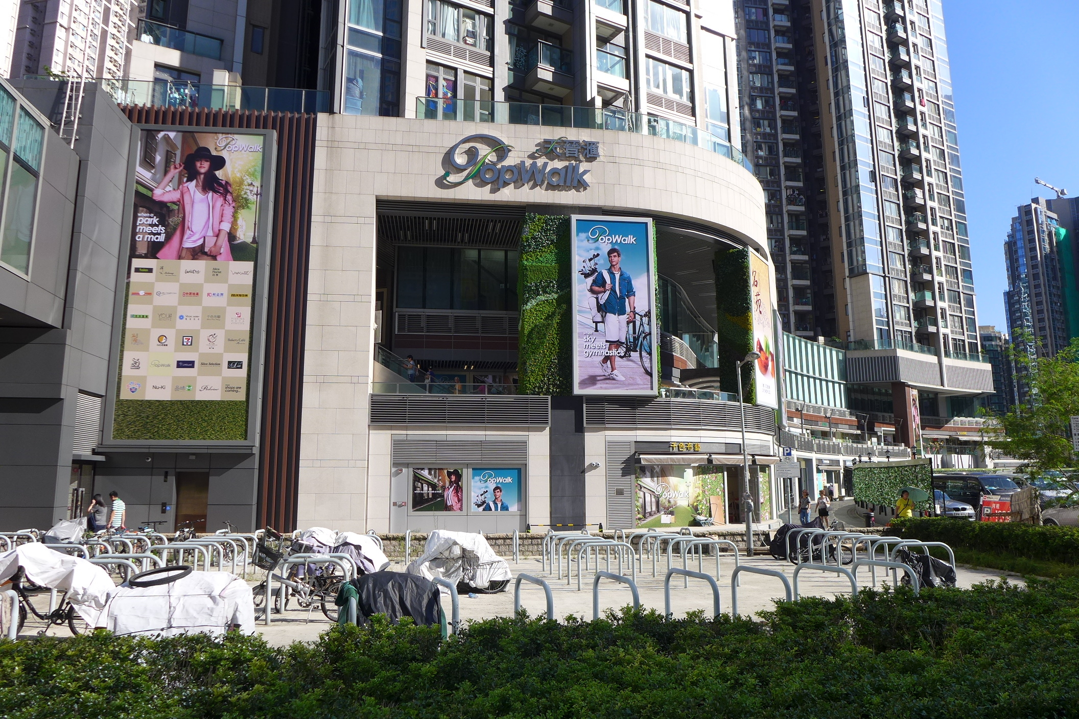 PopWalk